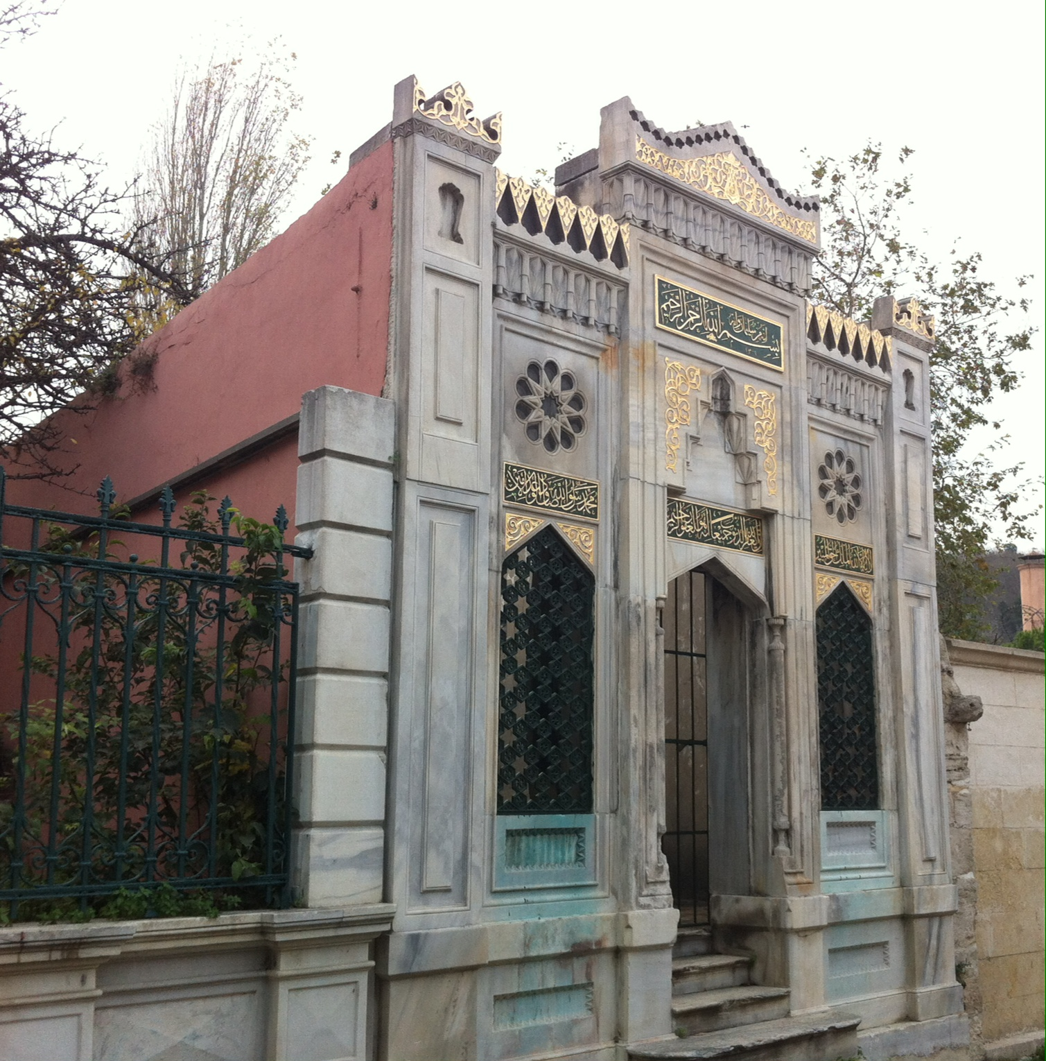 Telgraf Nazırı İzzet Efendi Türbesi-Eyüp